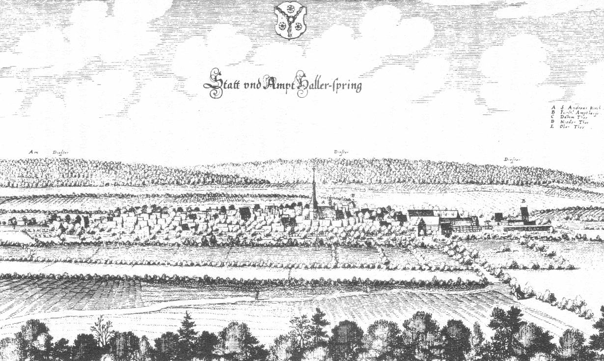 Springe als Merianstich um 1650